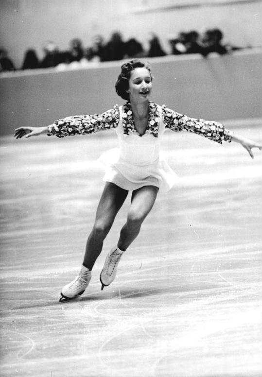 Carola Weissenberg ADN-ZB Reiche 20.11.76 Berlin: Eiskunstlauf - Kür der Damen beim Pokal der Blauen Schwerter. Die 13jährige Carola Weissenberg konnte sich im Pflicht - und Kurzprogramm bei den Internationalen Eiskunstlauf-Wettbewerben um den Pokal der Blauen Schwerter am 20.11.76 in der Berliner Werner-Seelenbinder-Halle beträchtlich verbesssern. In der Kür gelang ihr noch nicht alles. So errang sie mit der Platzziffer 24 und 134,28 Punkten den 3. Platz.